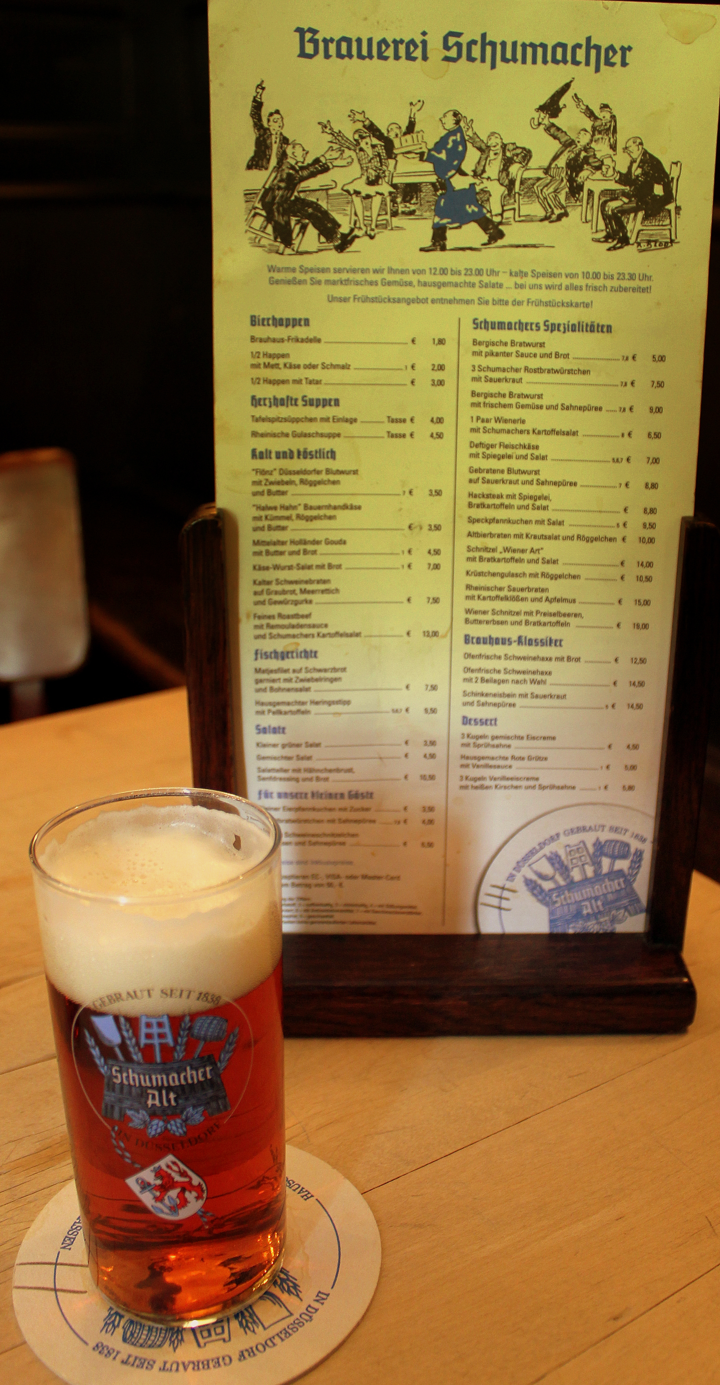 BIERBRAUEREI FERN SCHUMACHER OST STRASSE DUSSELDORF GERMANY APRIL 2013